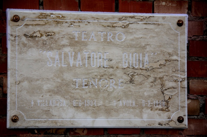 All_ingresso_del_teatro "Salvatore Gioia" si trova la targa_commemorativa_a Salvatore Gioia